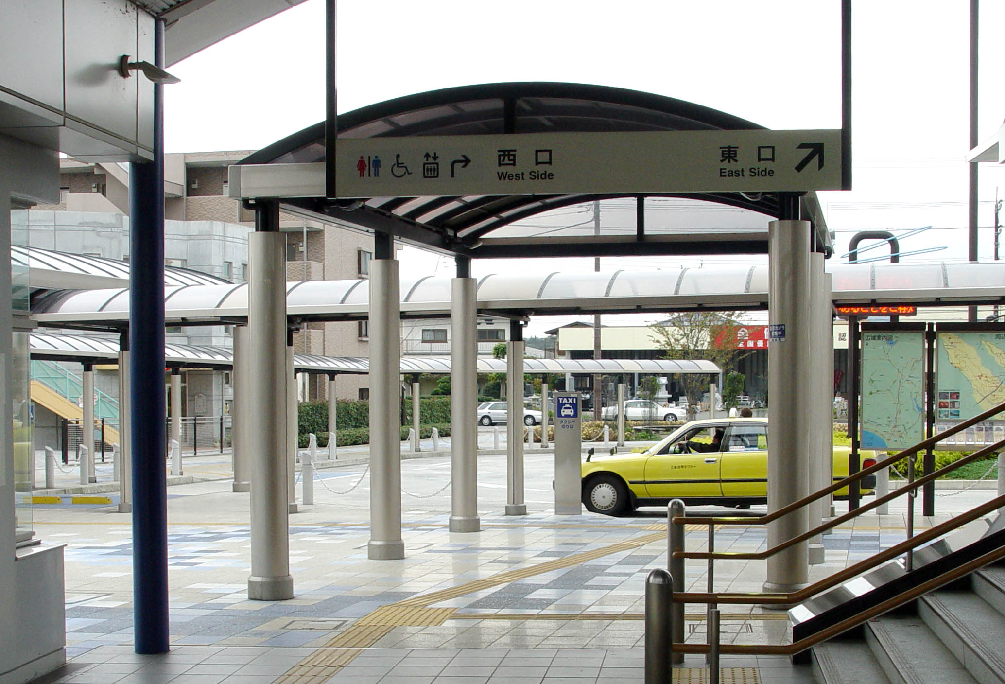 Nagaizuminameri Station, Gotenba Line, Japan